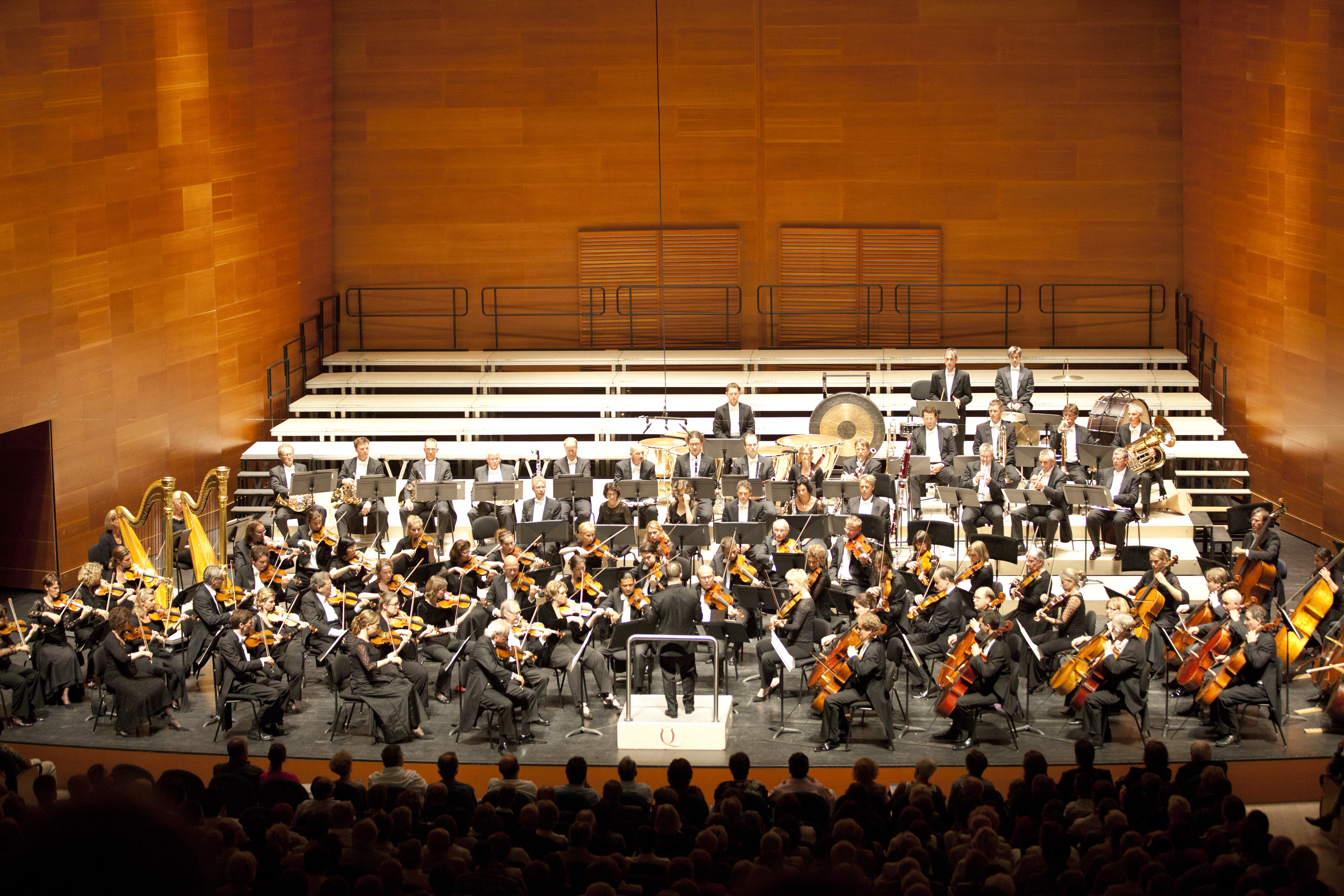 Rotterdams Philharmonisch Orkest in San Sebastián, Spain.